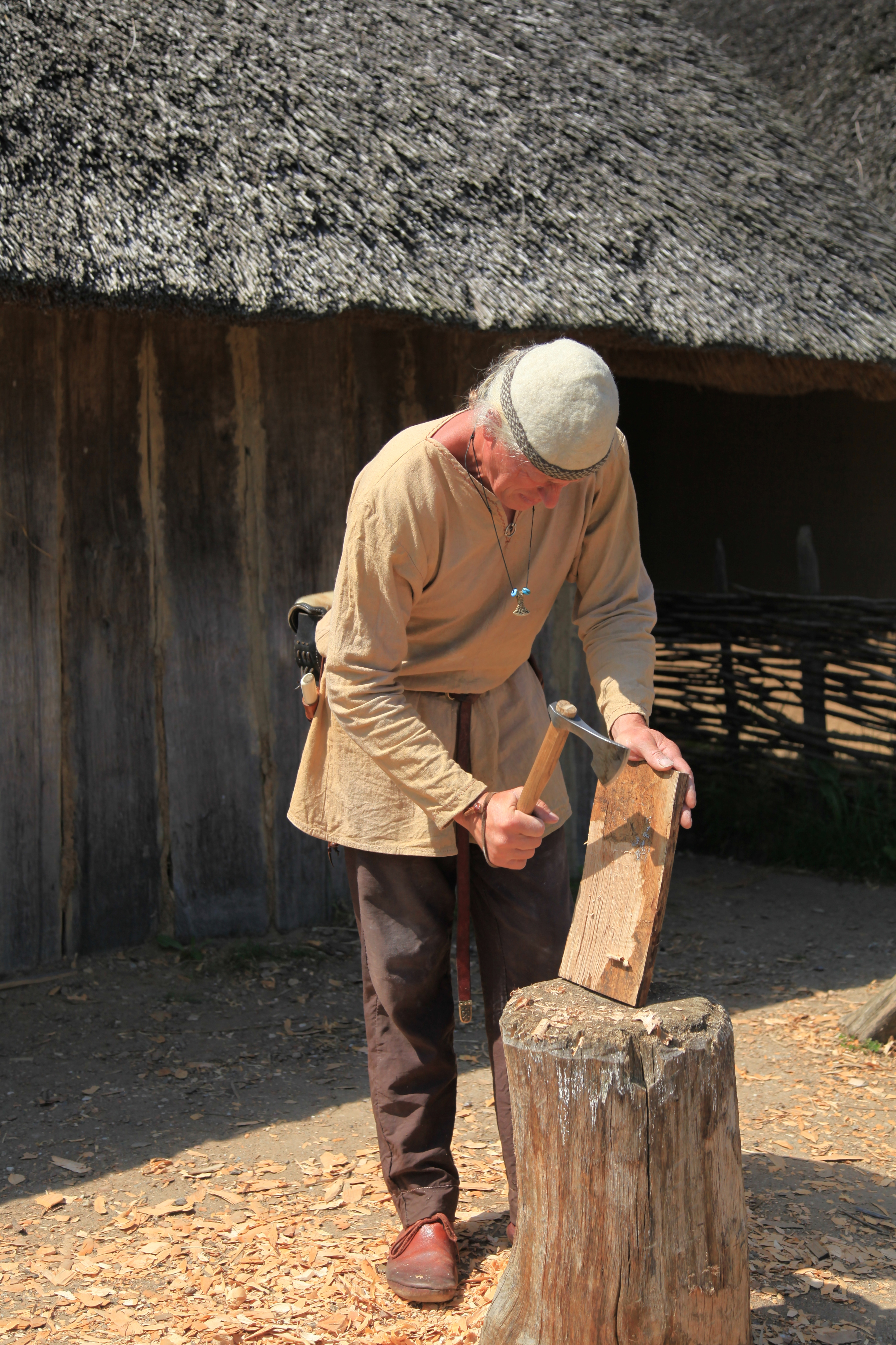 Freilichtmuseum: Rekonstruierte Wikinger-Häuser von Haithabu in Busdorf